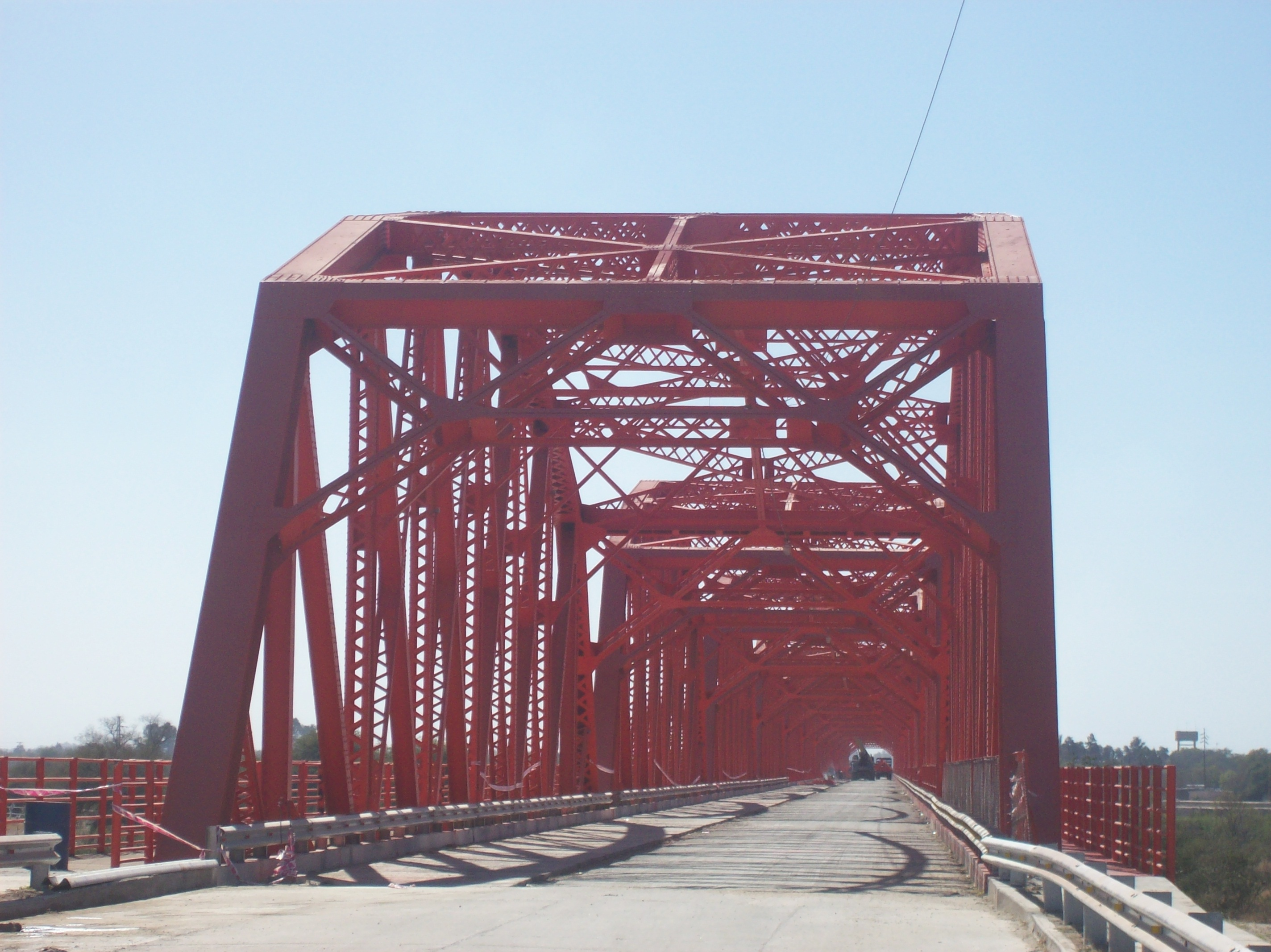 Puente carretero Santiago del Estero - La Banda sobre el Río Dulce. Ubicado en la provincia de Santiago del Estero, Argentina.